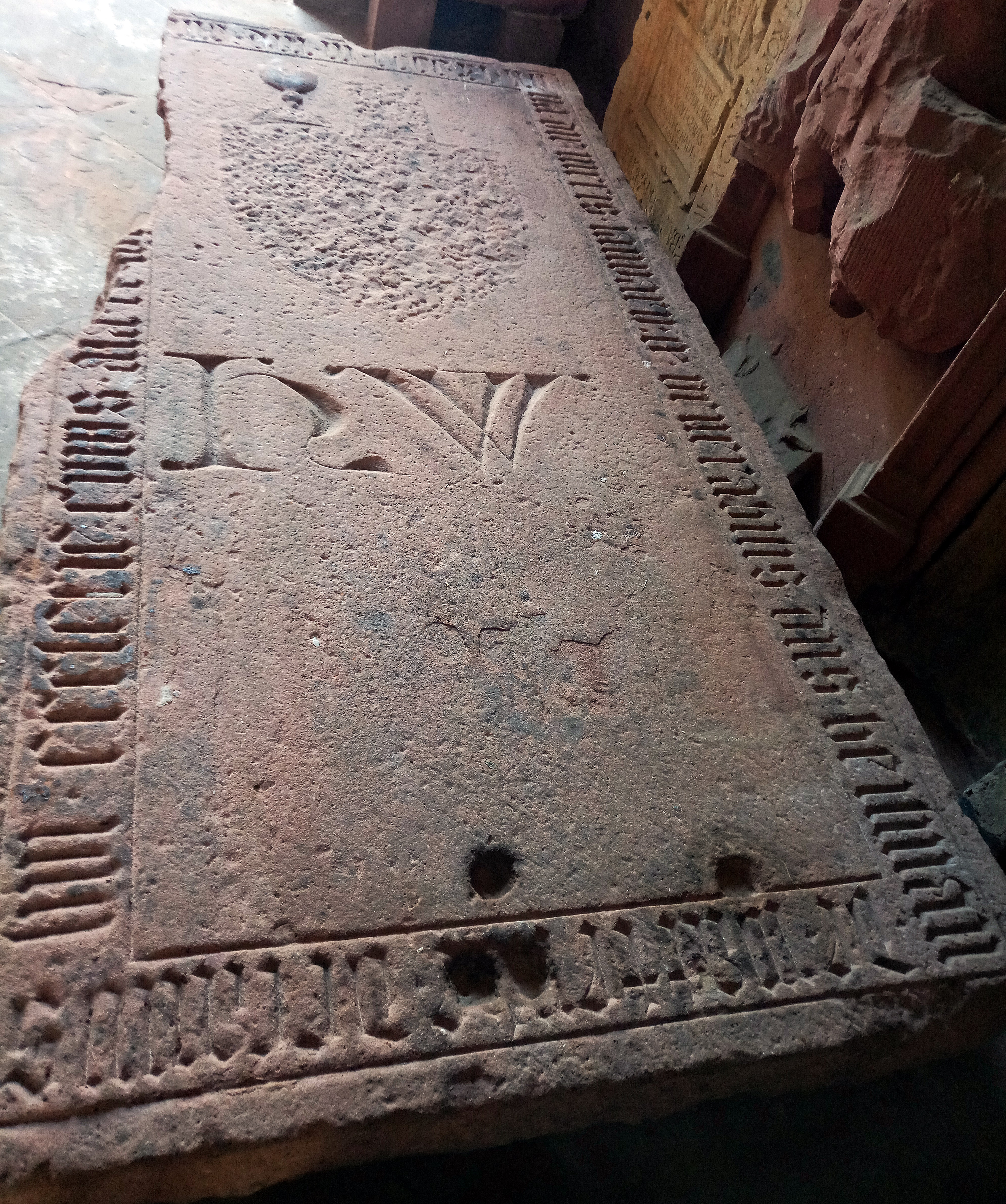 Stiftskirche Neustadt, Grabplatte des Stiftsdekans Heilmann von Wattenheim (+ 1411)